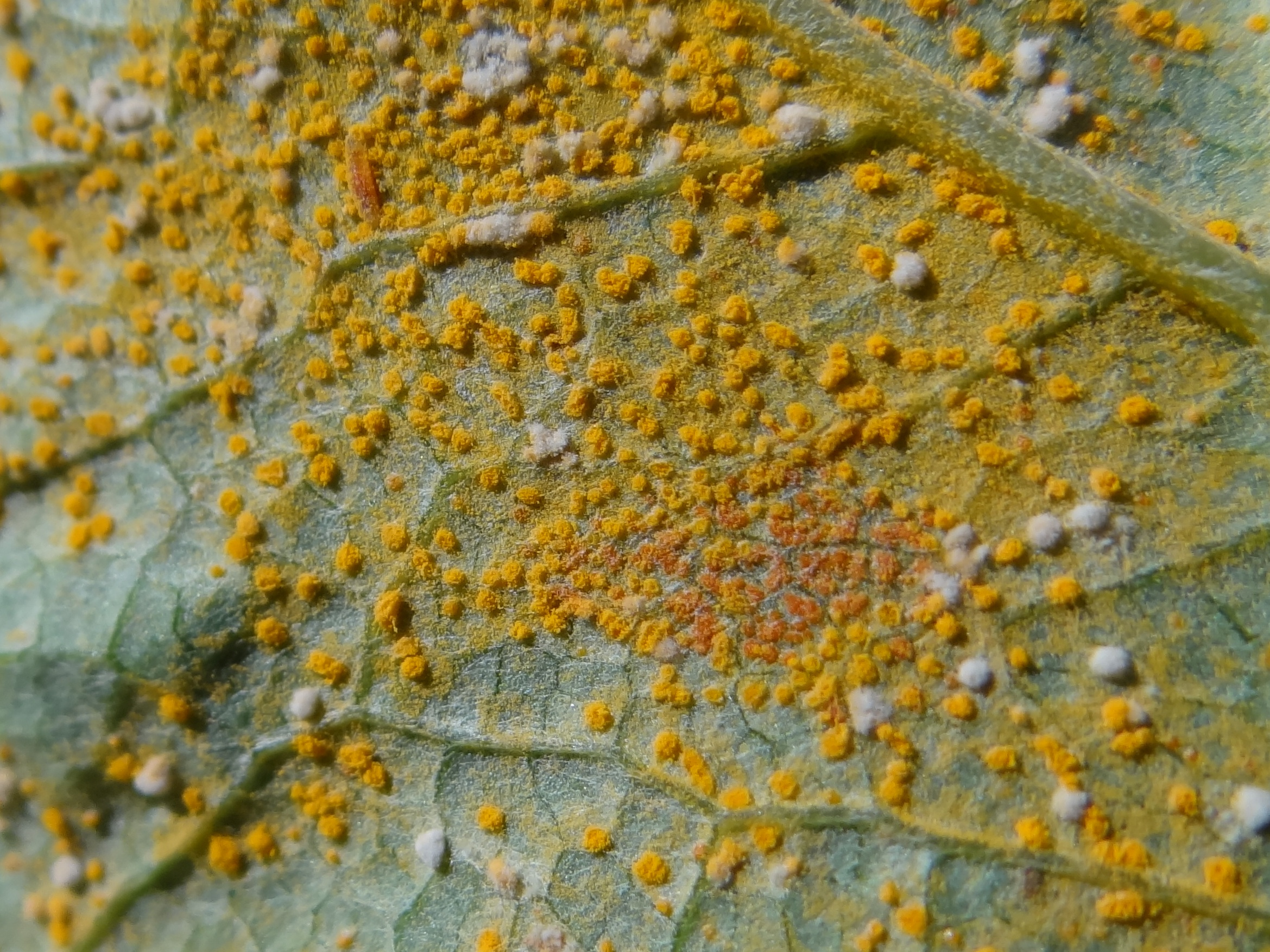 Coleosporium tussilaginis on Petasites alba